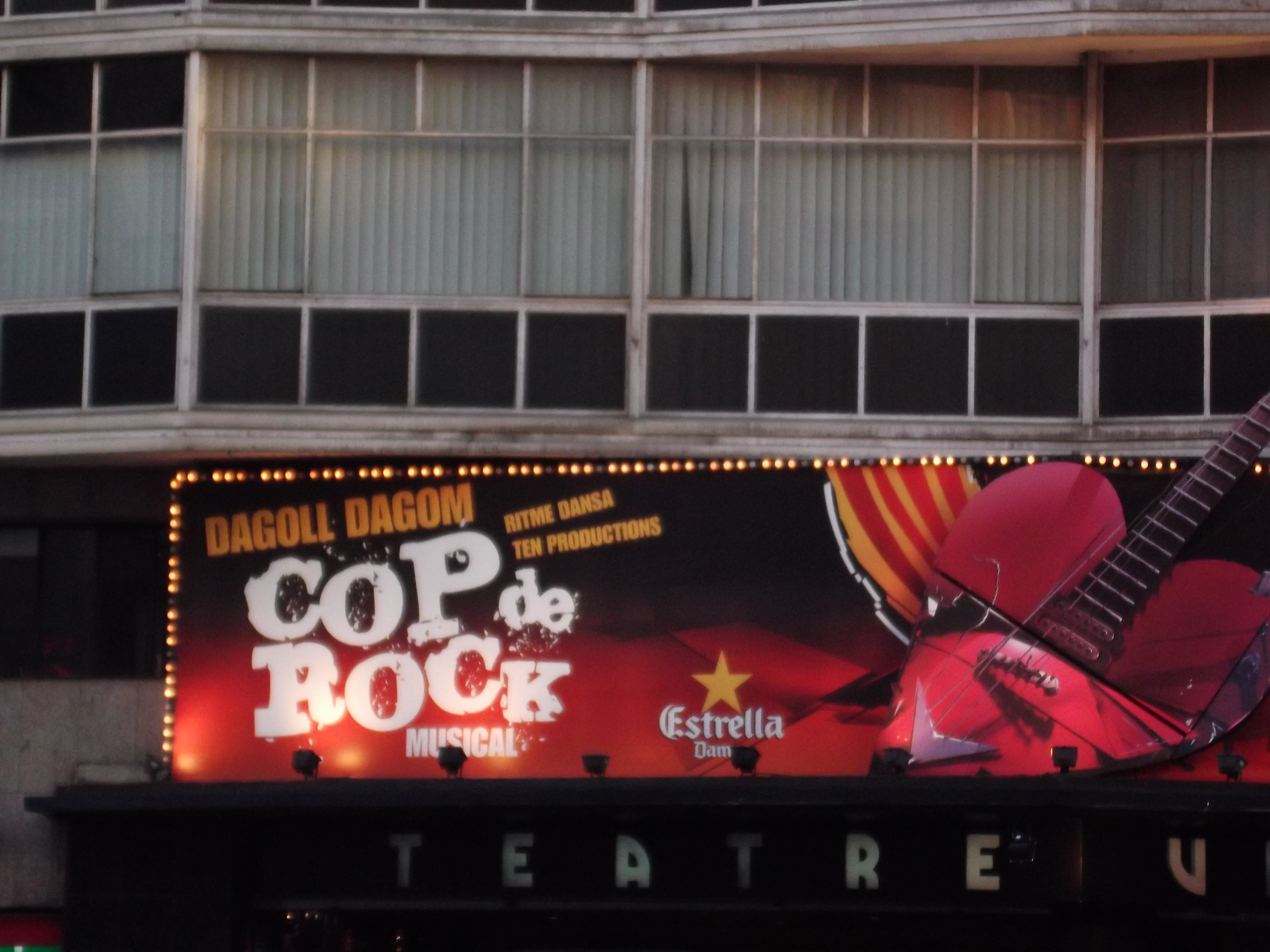 Teatre Victòria durant l'actuació del musical "Cop de Rock"